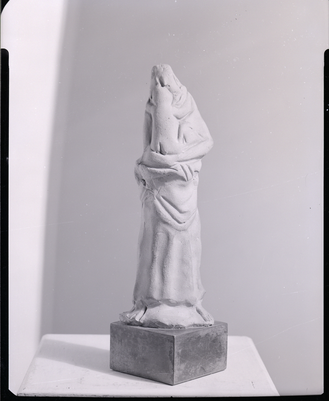 Arturo Martini, Figure e gruppi di figure tra cui una Deposizione, s.d., terrecotte. Galleria Il Milione? Servizio fotografico : Milano, 1963 / Paolo Monti. - Buste: 14, Fototipi: 14 : Negativo b/n, gelatina bromuro d'argento/ pellicola ; 10x12. - ((Serie costituita da 14 buste sciolte di negativi identificati con i nn.: 22373, 22374, 22375, 22376, 22377, 22378, 22379, 22380, 22381, 22382, 22383, 22384, 22385, 22386, 22387. - Sulla busta identificata con il n. 22373 iscrizione didascalica manoscritta a pennarello. - Sul coperchio della scatola iscrizione didascalica manoscritta a pennarello: "Duplicati".